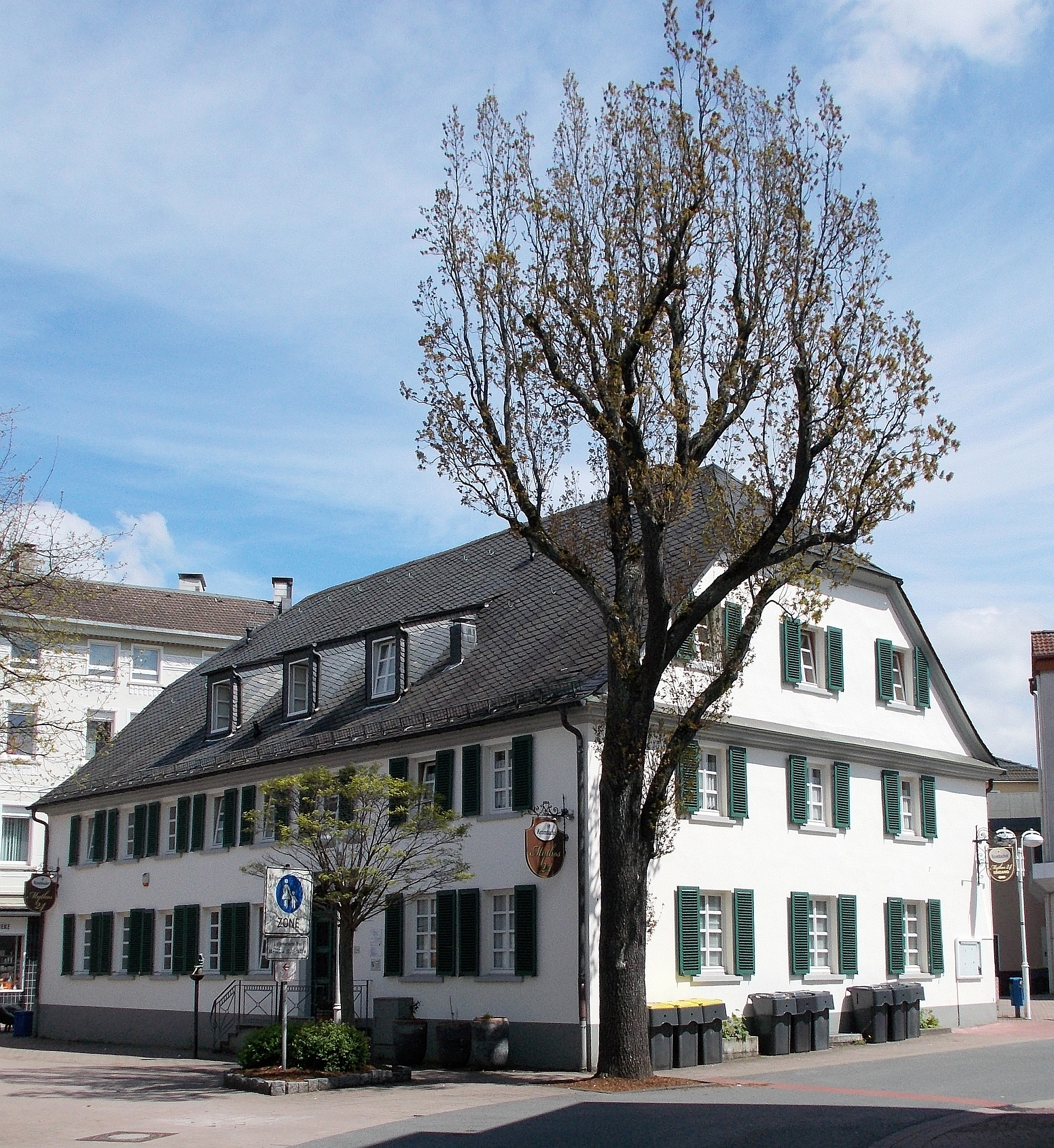 Denkmalgeschützter Busenhof in Werdohl